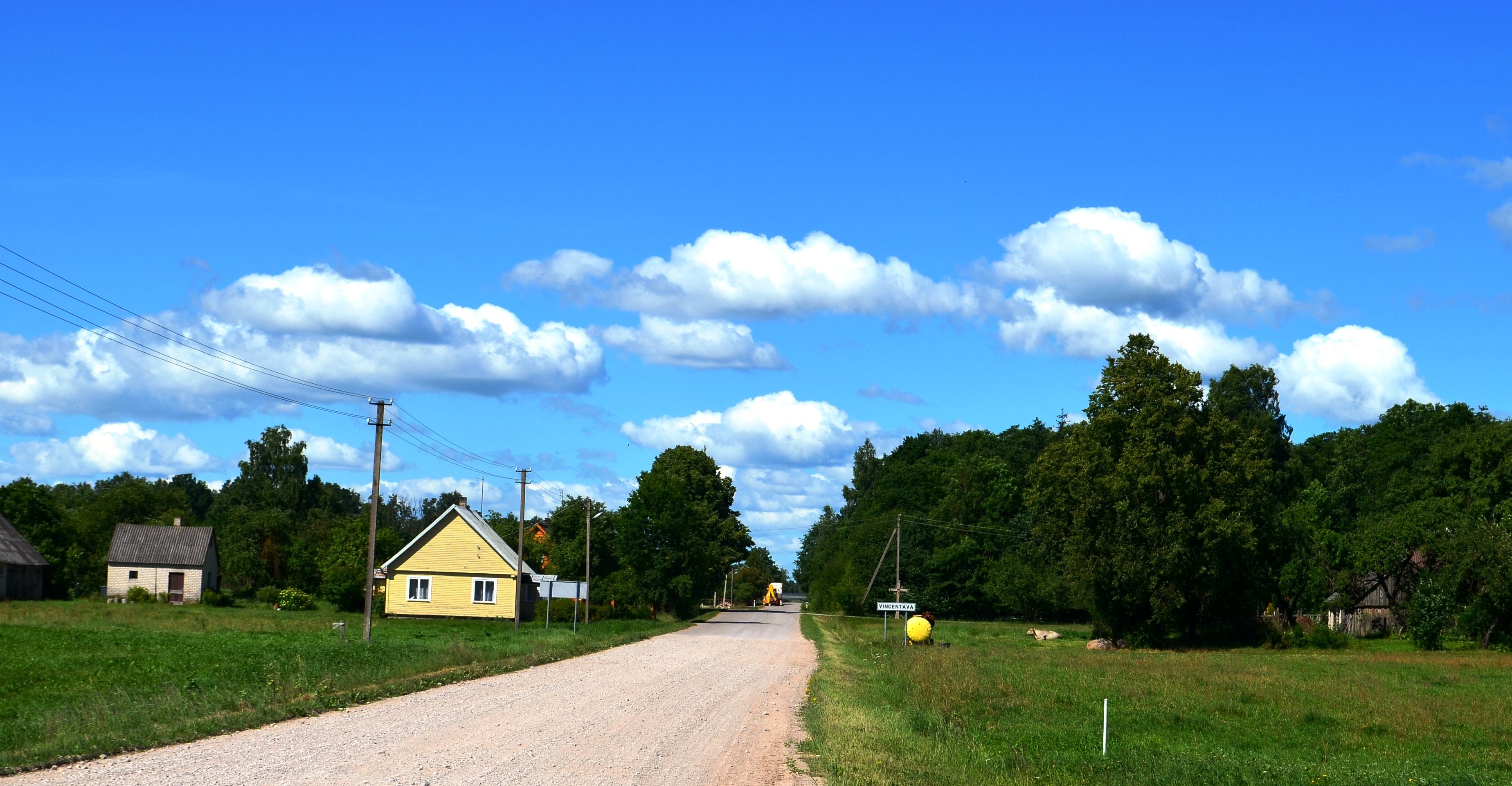 Vincentava, Kėdainių raj.